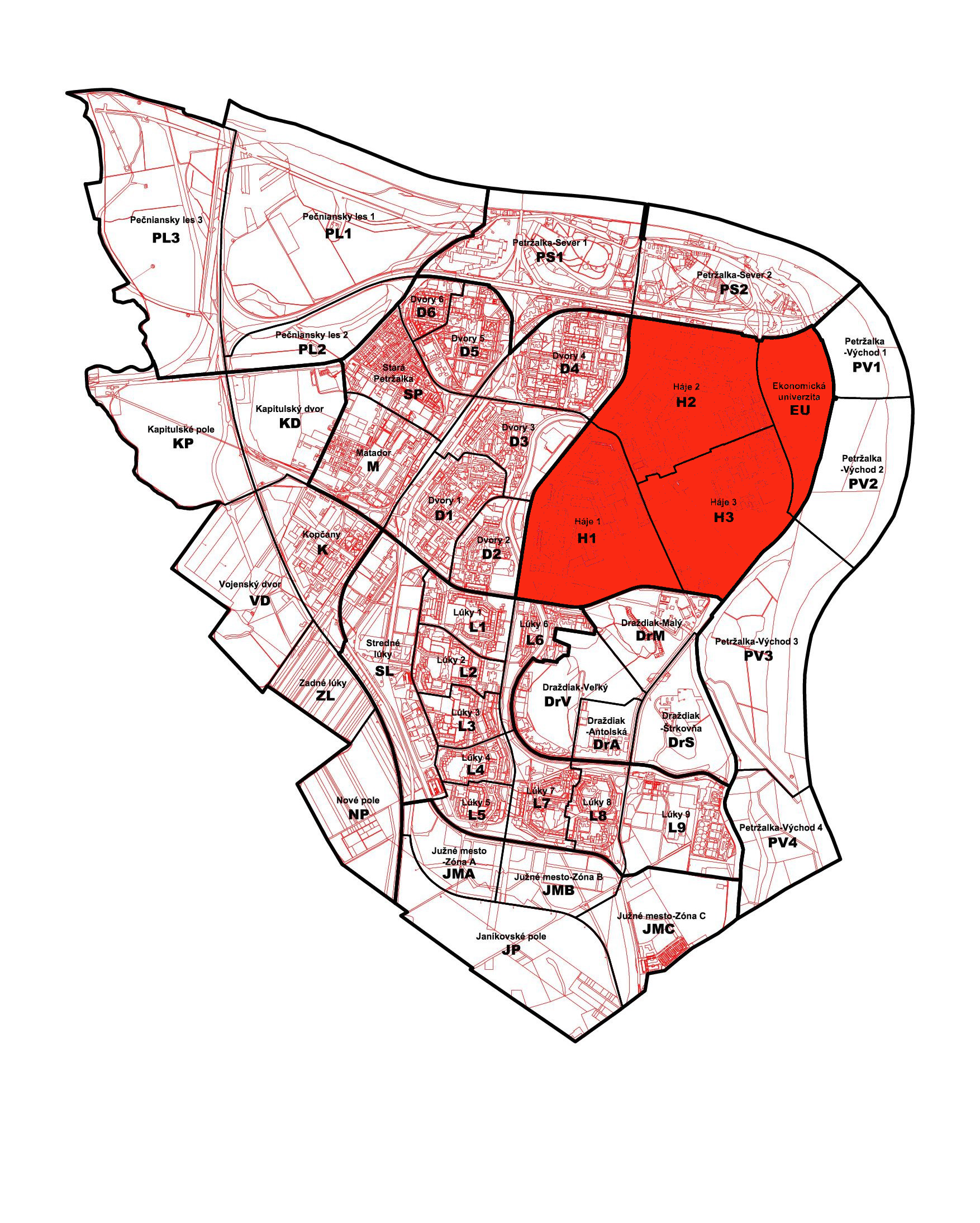 Poloha miestnej časti Petržalky